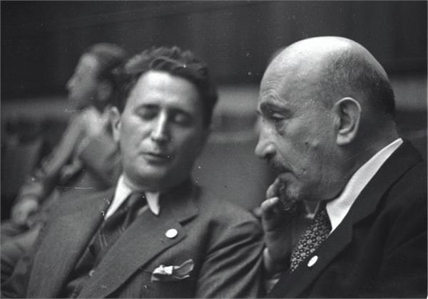 דוקטור חיים ויצמן ודוקטור גולדמן